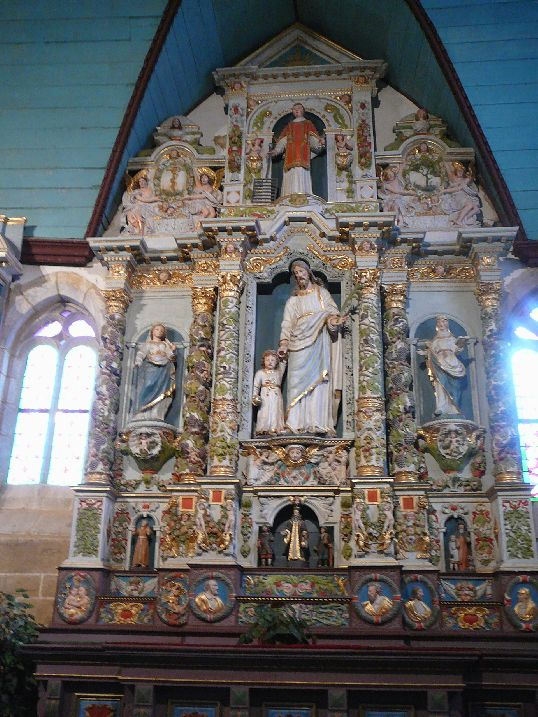 Guimiliau : église Saint-Miliau : retable de Saint-Joseph